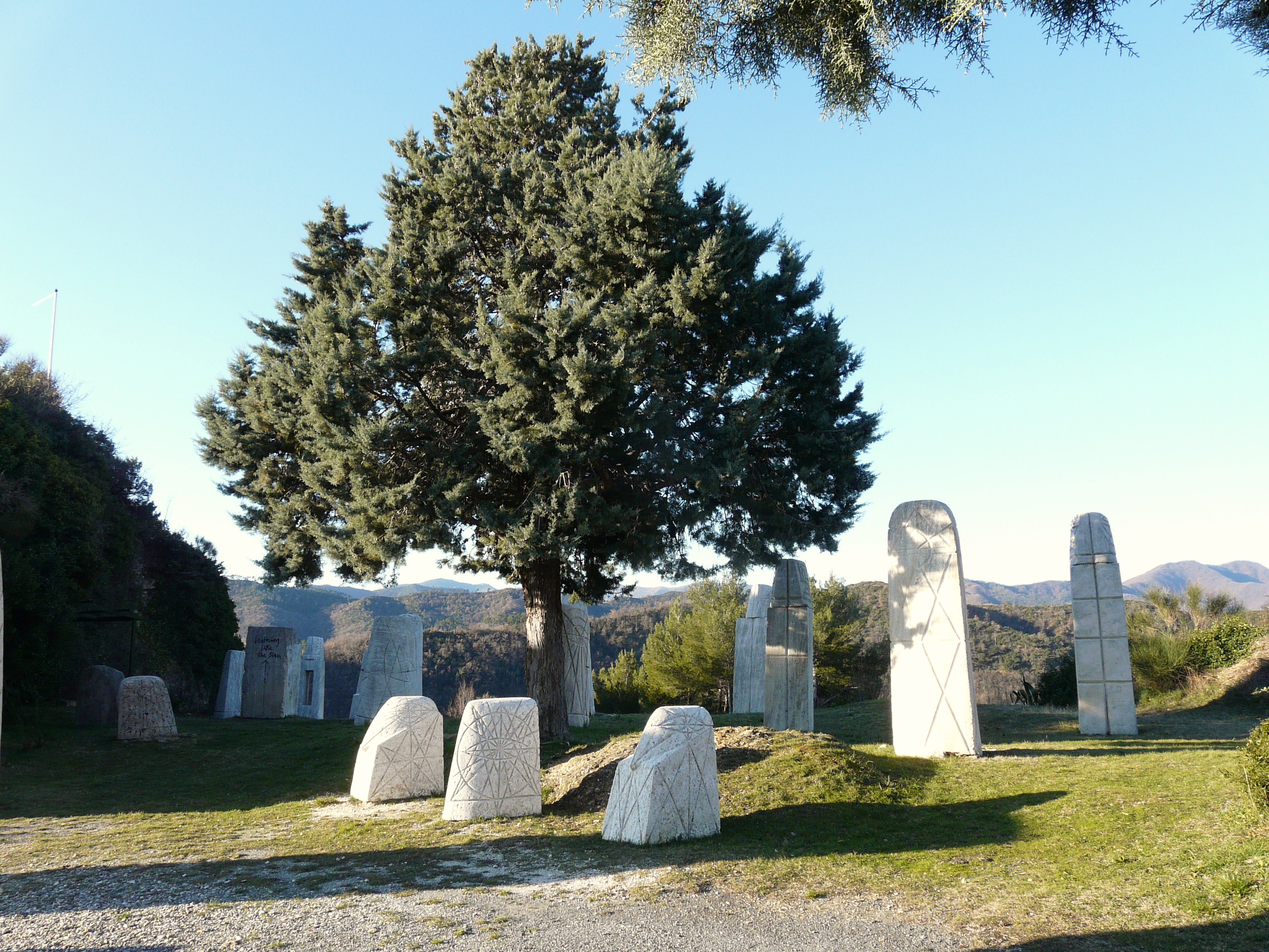 Sculture presso il Castellaro, Vendone, Liguria, Italia